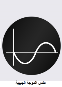 عكس الموجةالجيبية